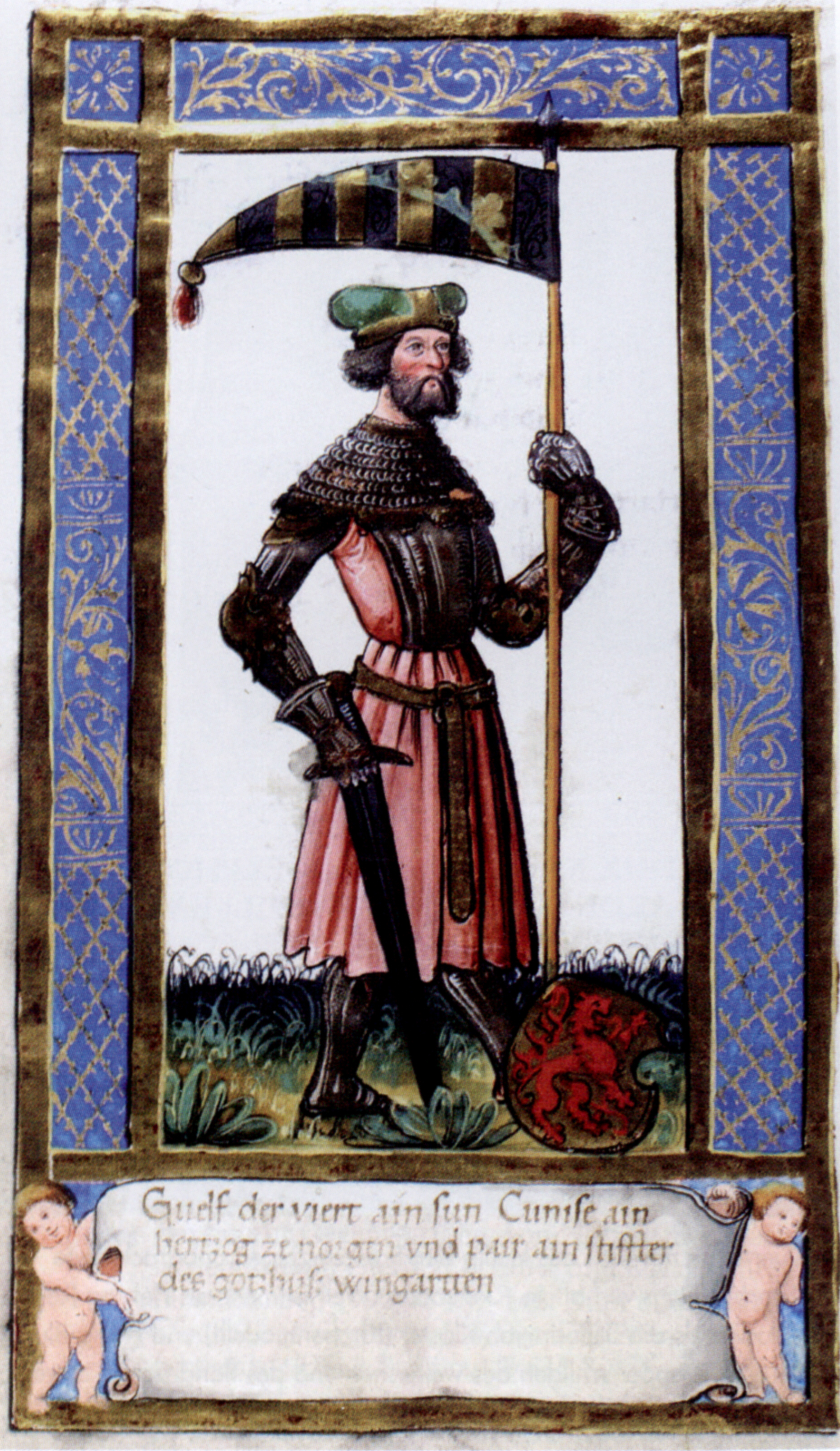 Stifterbüchlein, entstanden um 1500 für die Reichsabtei Weingarten, Stuttgart, Württembergische Landesbibliothek, Cod. hist. Q 584, fol. 25v, Welf IV.